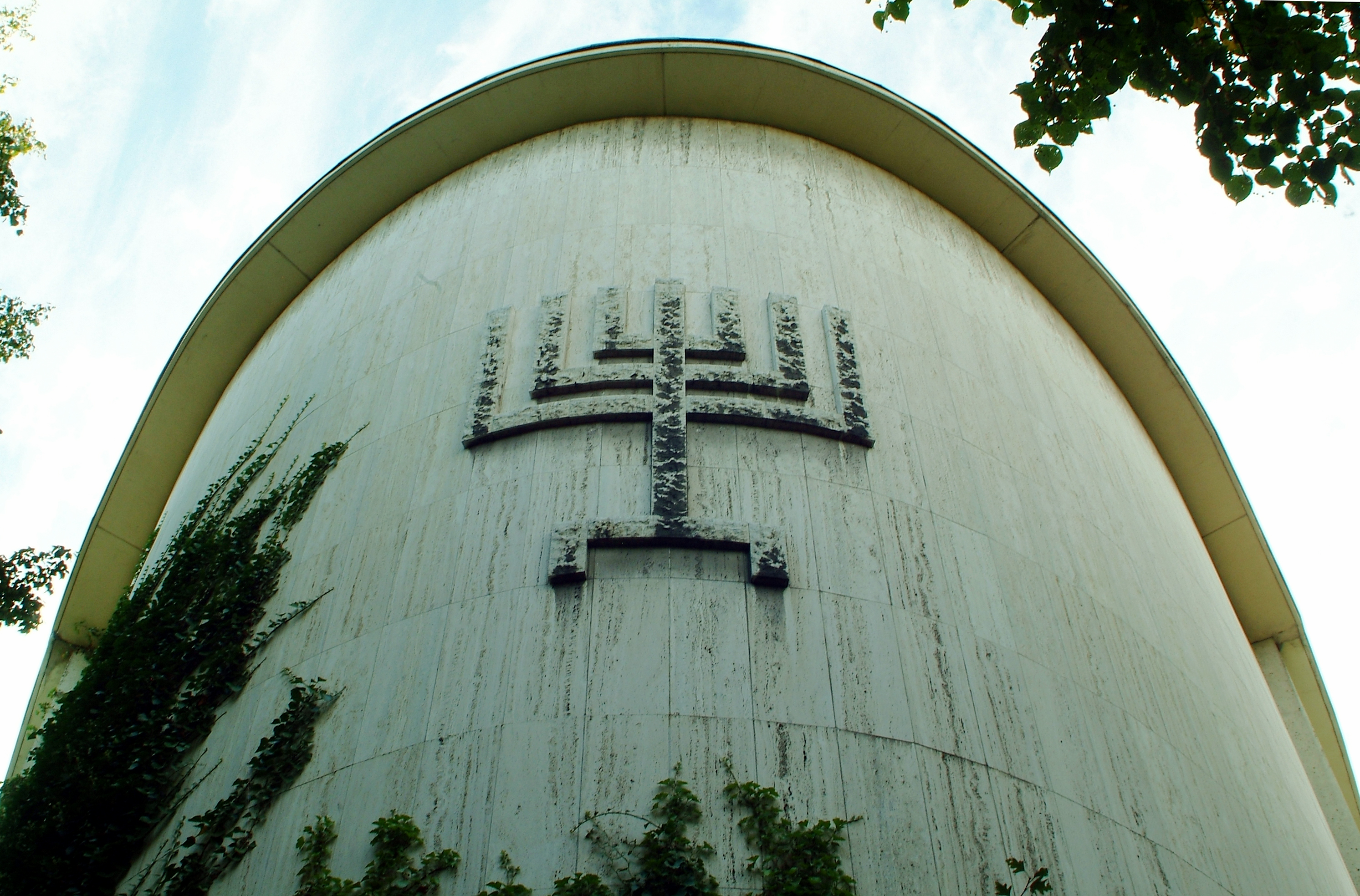 "Vor lauter Bäumen ..." in der Freundallee in Hannover ist die Synagoge des Jüdischen Gemeindezentrums kaum noch zu erkennen. Der Frankfurter Architekt Hermann Zi Guttmann baute das Gotteshaus von 1961 bis 1963 mit nach Osten ansteigendem Flachdach und ovalem Umgang auf Parabelgrundriss. Das Relief an der Aussenwand zeigt eine Menora, den 7-armigen Leuchter ...